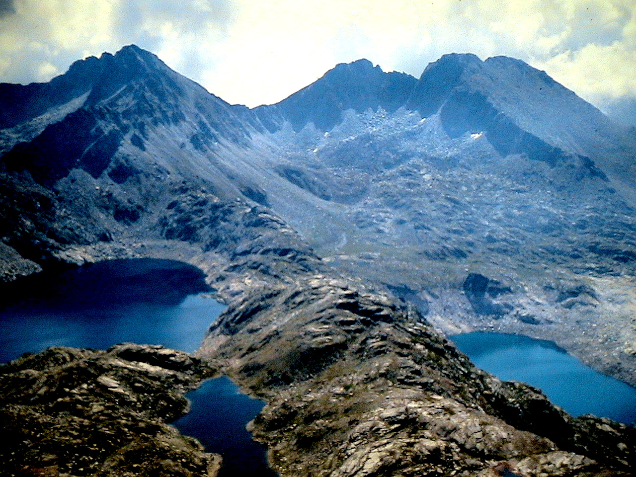 Estanys Saburó i Mar, des del pic dels Vidals. La Torre de Cabdella (Pallars Jussà - Catalunya). Foto presa de la projecció d'una diapositiva.